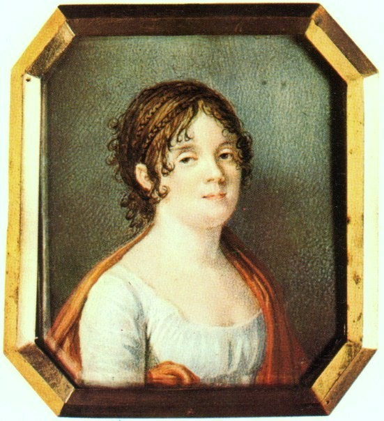 Екатерина Александровна Толстая, ур. Вяземская (1769—1824)